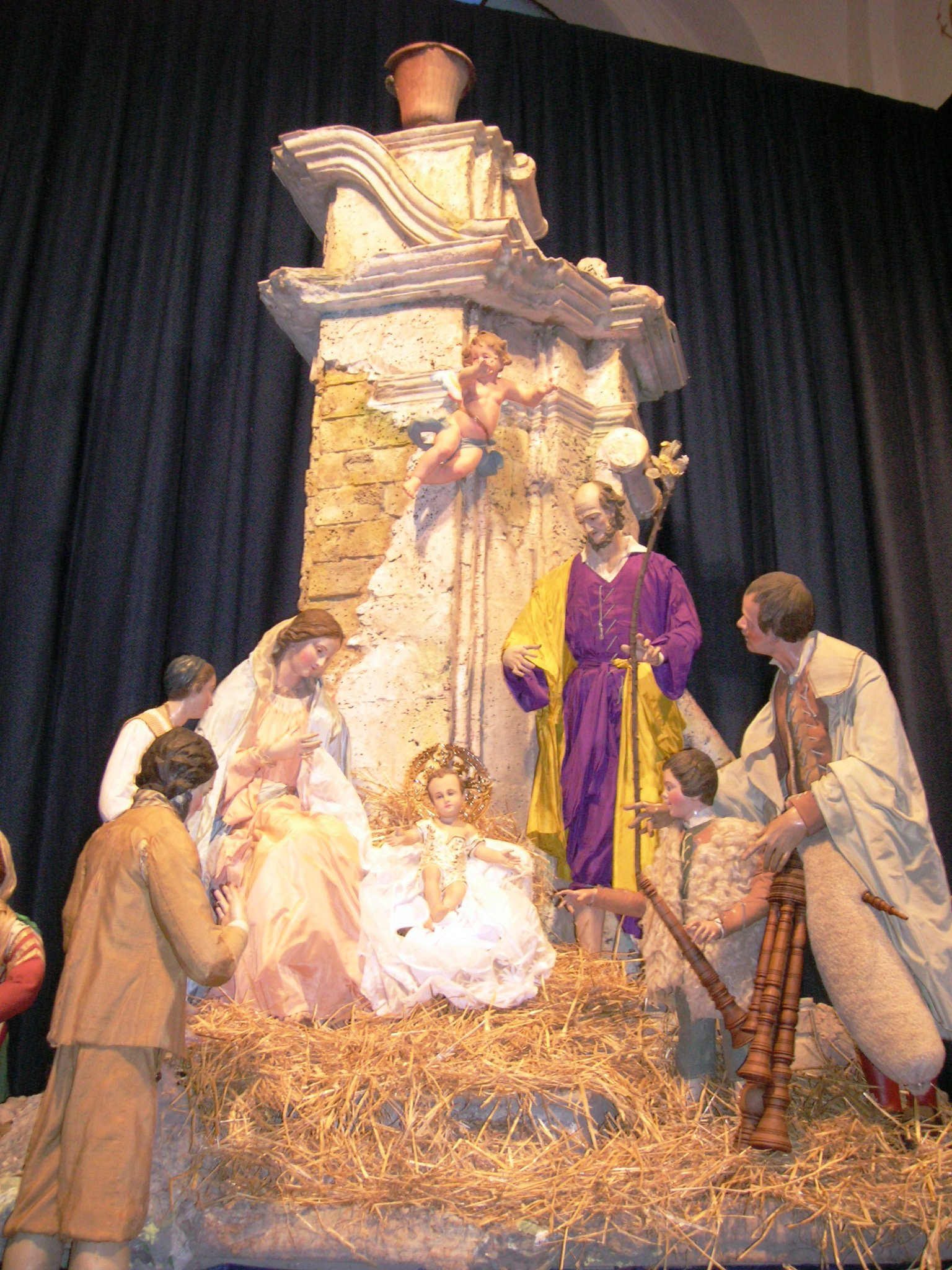 Presepe della concattedrale di Maria Santissima Assunta a Castellammare di Stabia